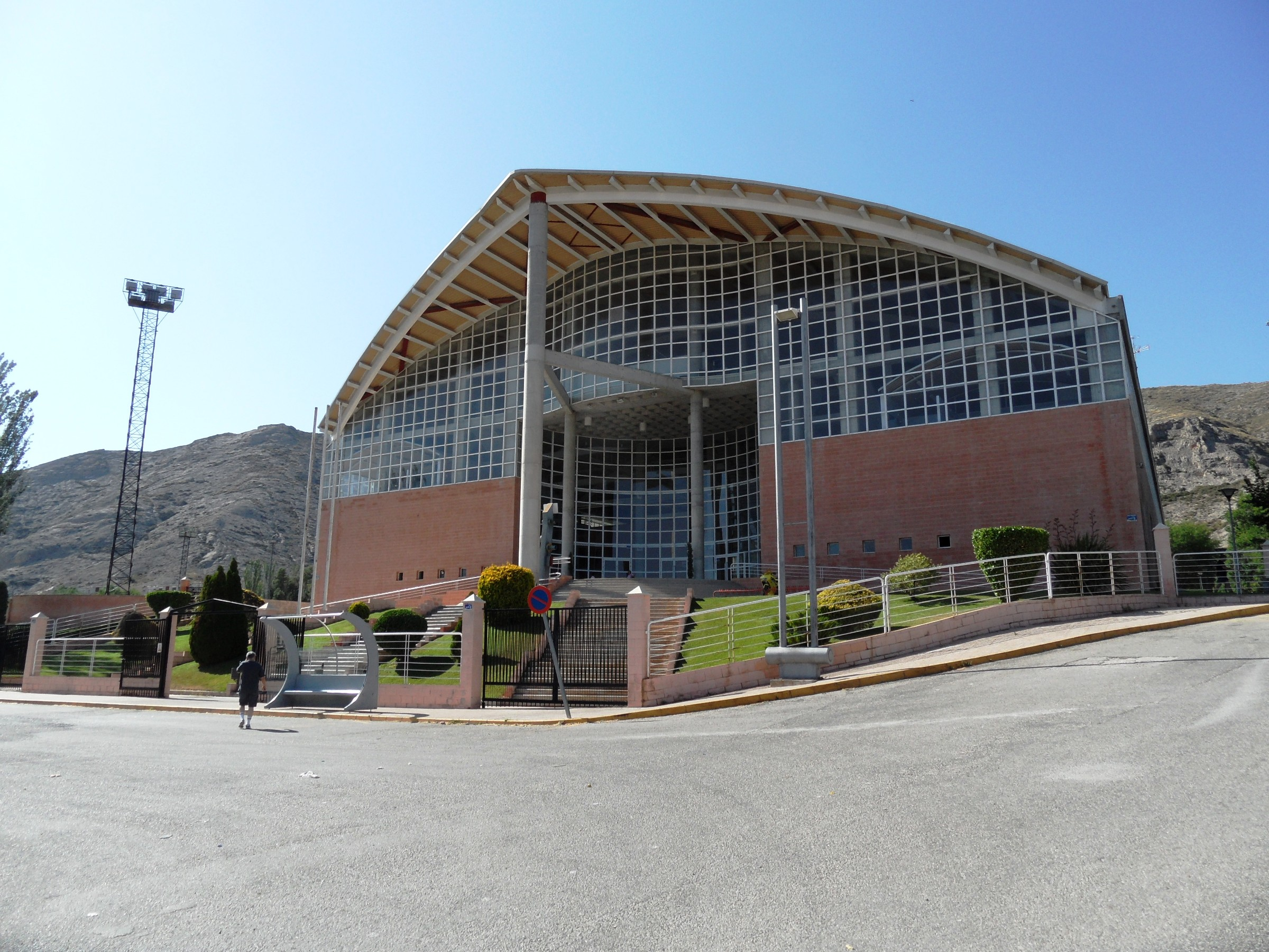 Poliesportiu de Villena.